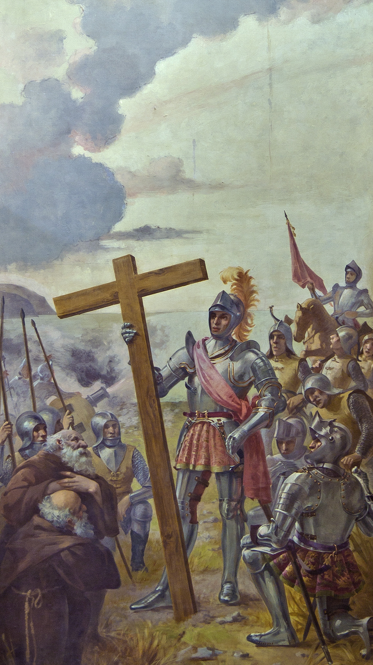 Das Bild „El desembarco“ wurde zu Beginn des 20. Jahrhunderts von Manuel Gonzalez Mendez geschaffen. Es befindet sich an der Stirnwand des Kanarischen Parlaments in Santa Cruz de Tenerife.